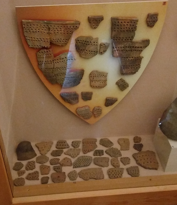 Фрагменты ямочно-гребенчатой керамики в археологическом музее на территории Кирилло-Белозерского монастыря (Вологодская область).